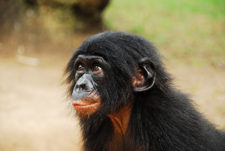 Pan paniscus